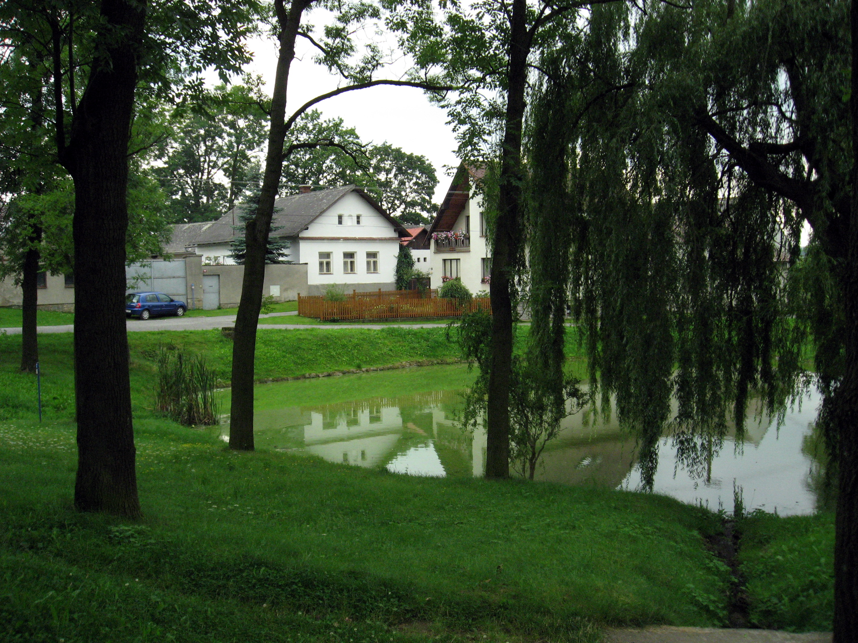 Michalovice, centrum obce